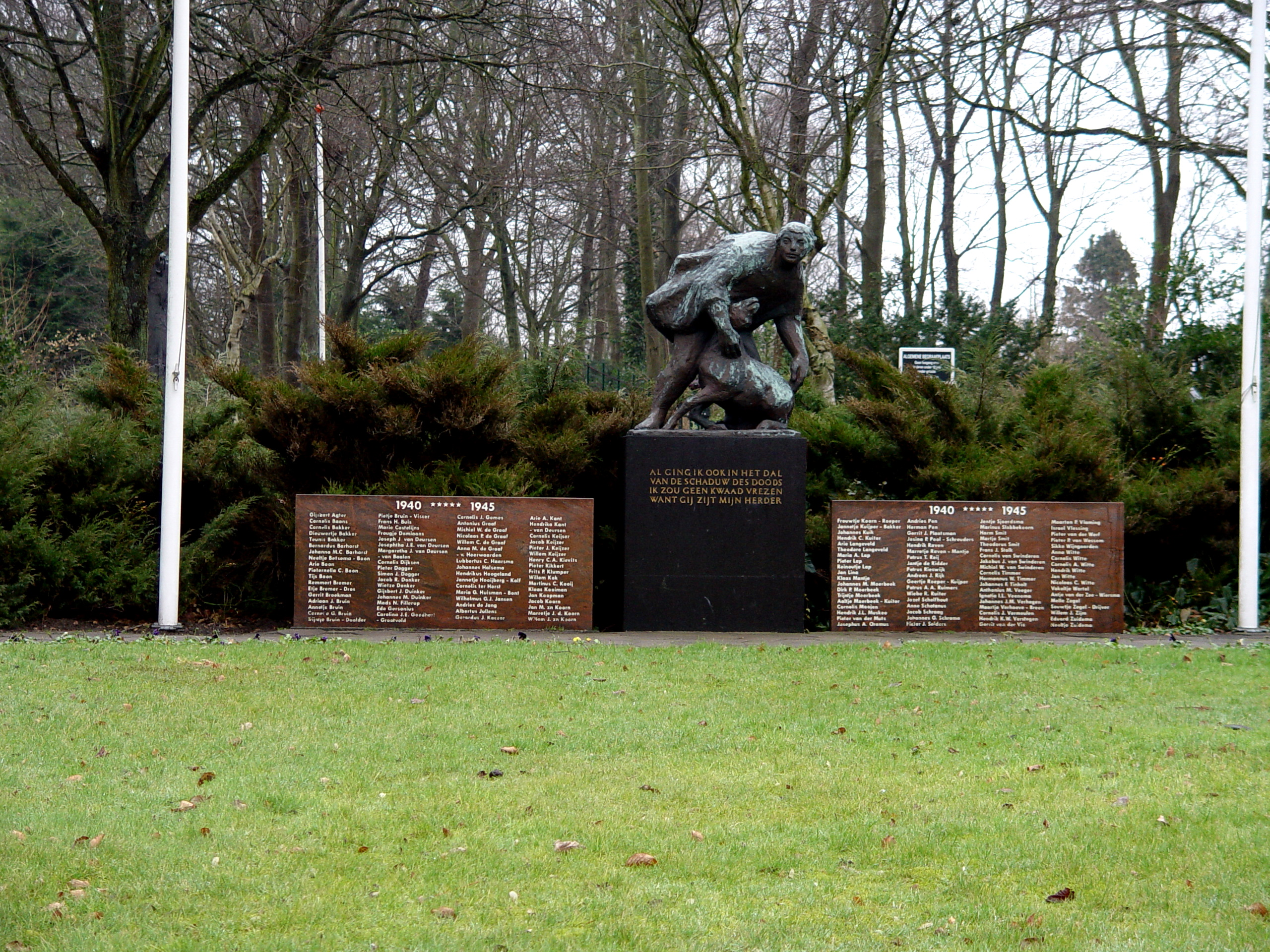 Texel - Den Burg - oorlogsmonument bij de ingang van de begraafplaats